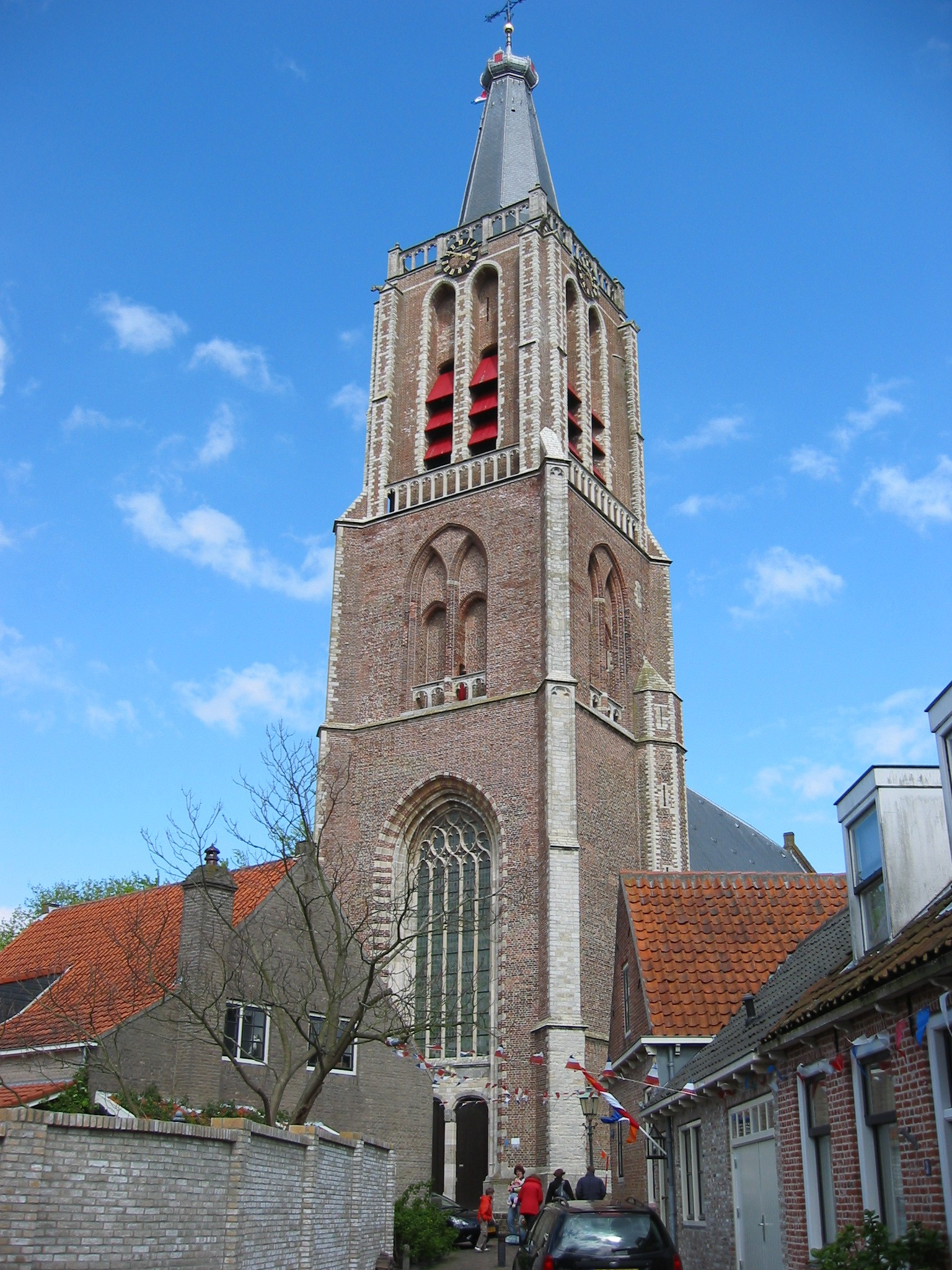 Geerteskerk (Geertes church), Kloetinge, NL